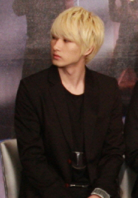 LG전자는 26일 저녁 대만 카오슝市에 위치한 '카오슝 아레나(Kaohsiung Arena)'에서 1만3천여 명의 관객이 운집한 가운데 열린 CJ주관 'M Live 콘서트'를 공식 후원했다. 콘서트에 앞서 공연장 인근 '샤또 데 신(CHATEAU de CHINE)' 호텔에서 LG 스마트폰 사용 고객 200명을 특별 초청해 'LG 옵티머스 슈퍼주니어 팬미팅' 행사를 개최했다.